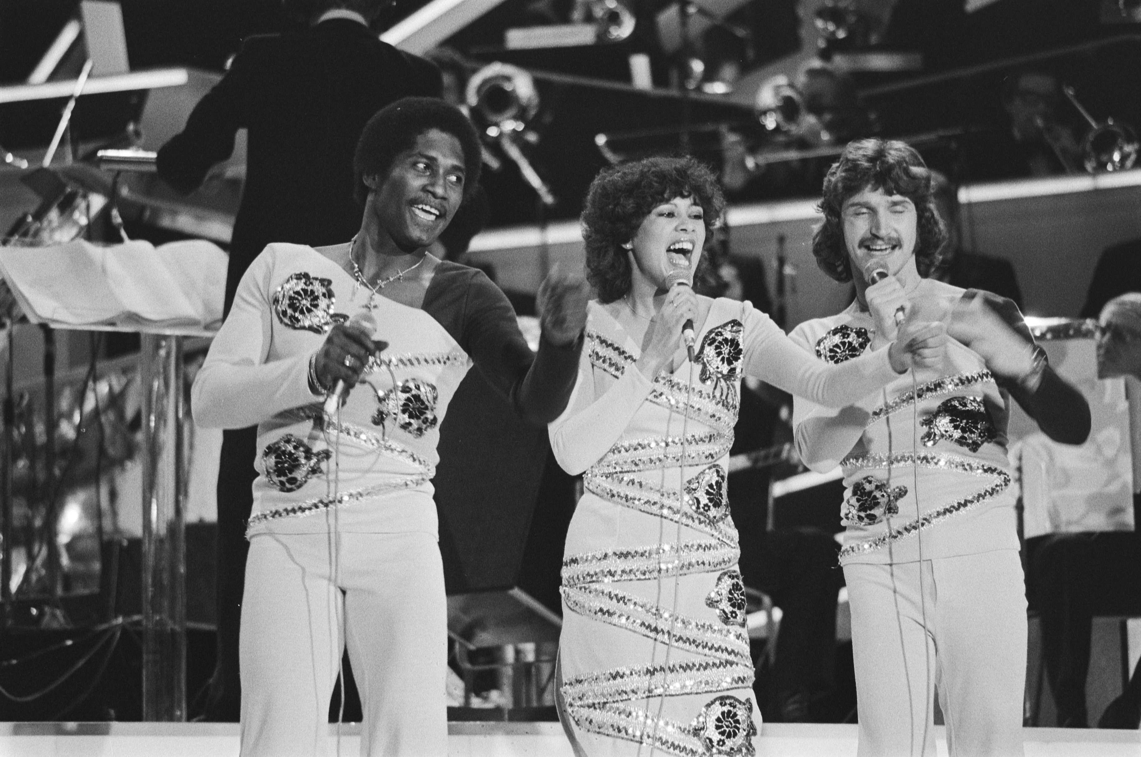 Harmony tijdens het Nationaal Songfestival 1978